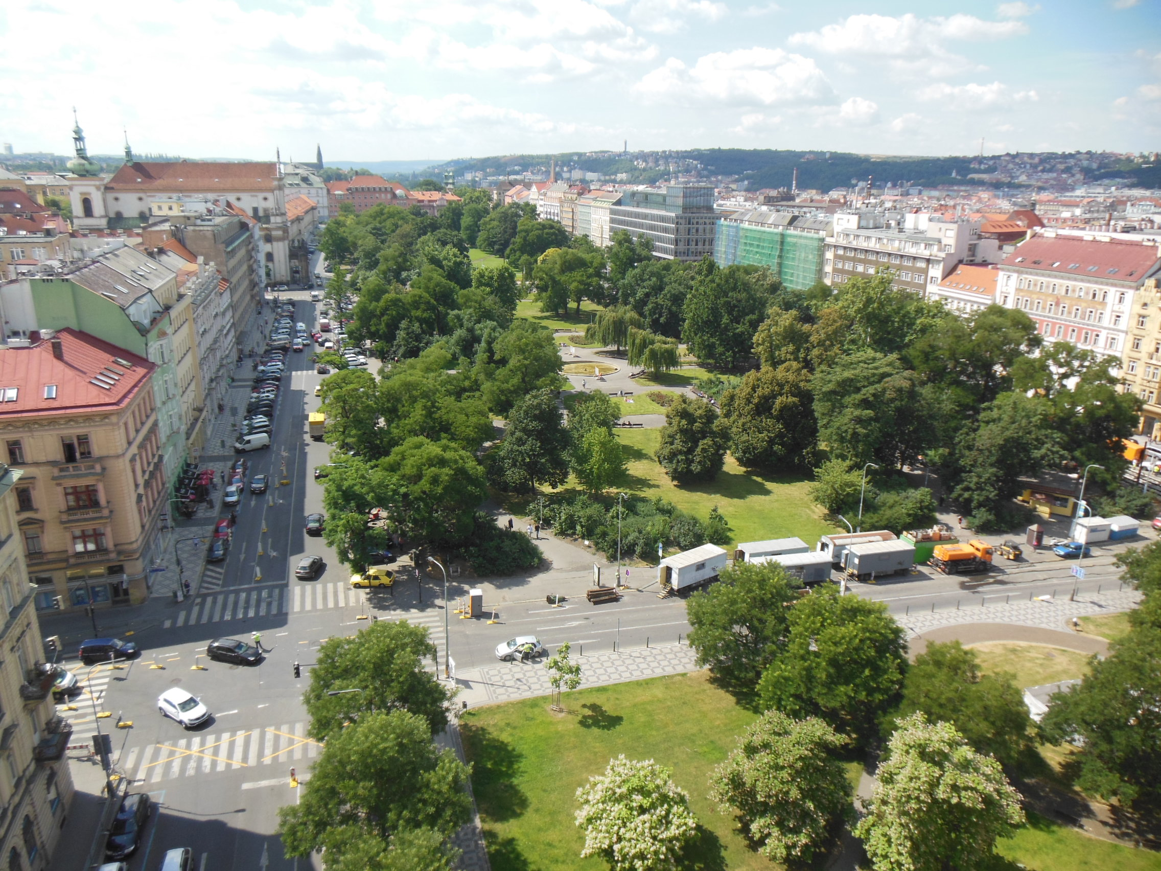 Praha-Nové Město. Karlovo náměstí, věž Novoměstské radnice, pohled na Karlovo náměstí.